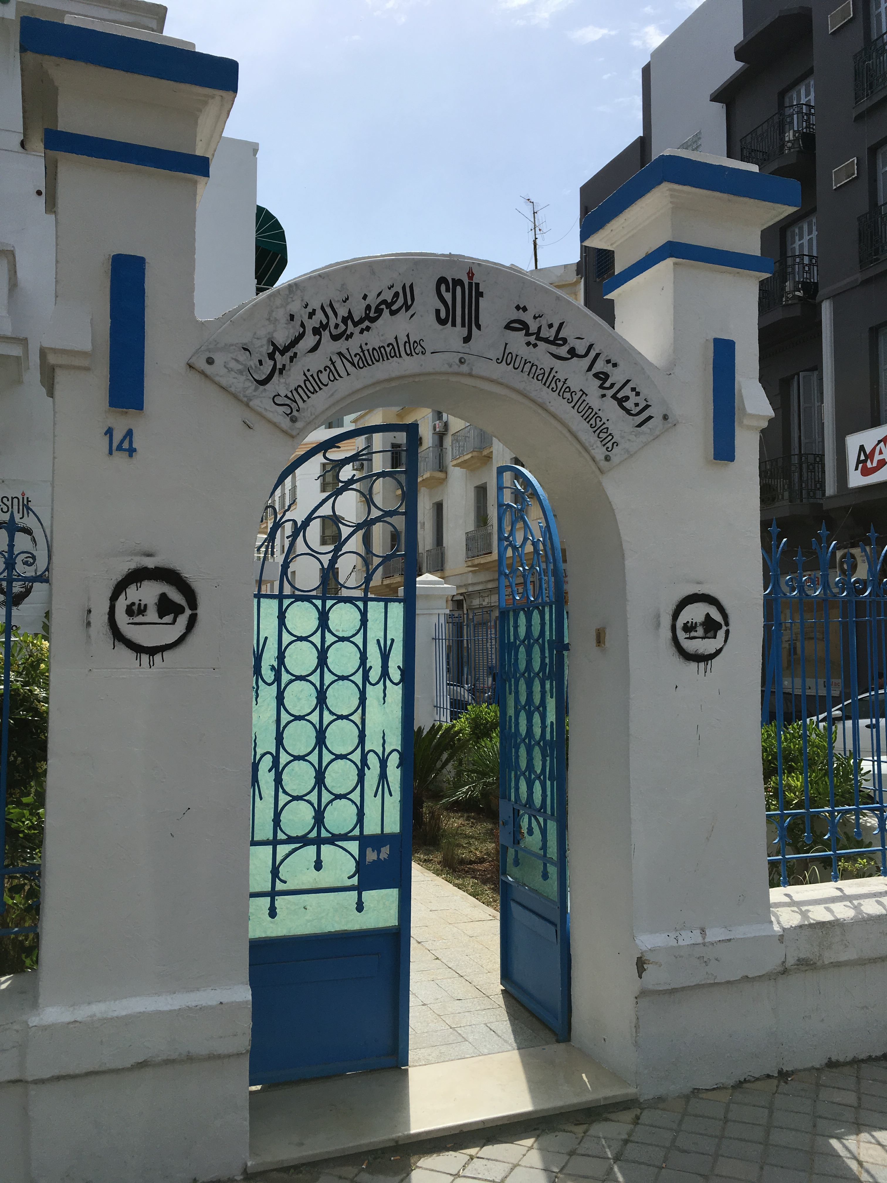 Belvédère, Tunis البلفيدير، تونس العاصمة